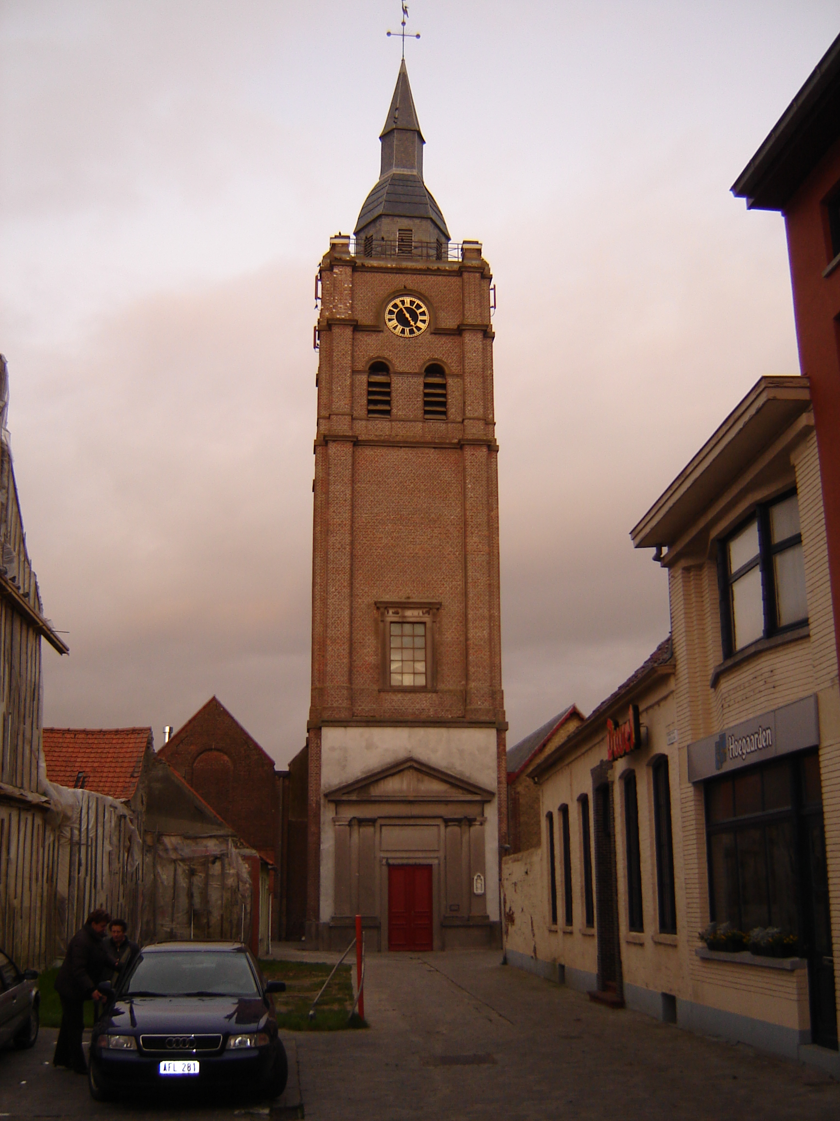 Sint-Martinuskerk, Roesbrugge. Saint Martinus Church in Roesbrugge, Roesbrugge-Haringe, Poperinge, West-Flanders, Belgium.